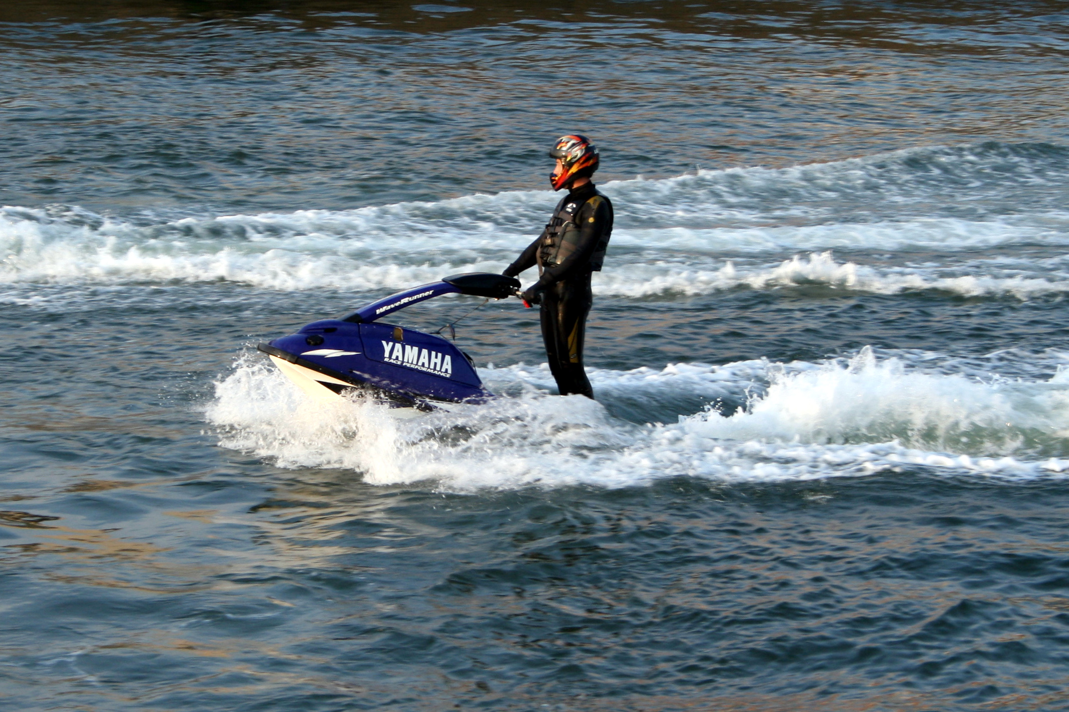 Jet ski sortant du chenal du port de Capbreton